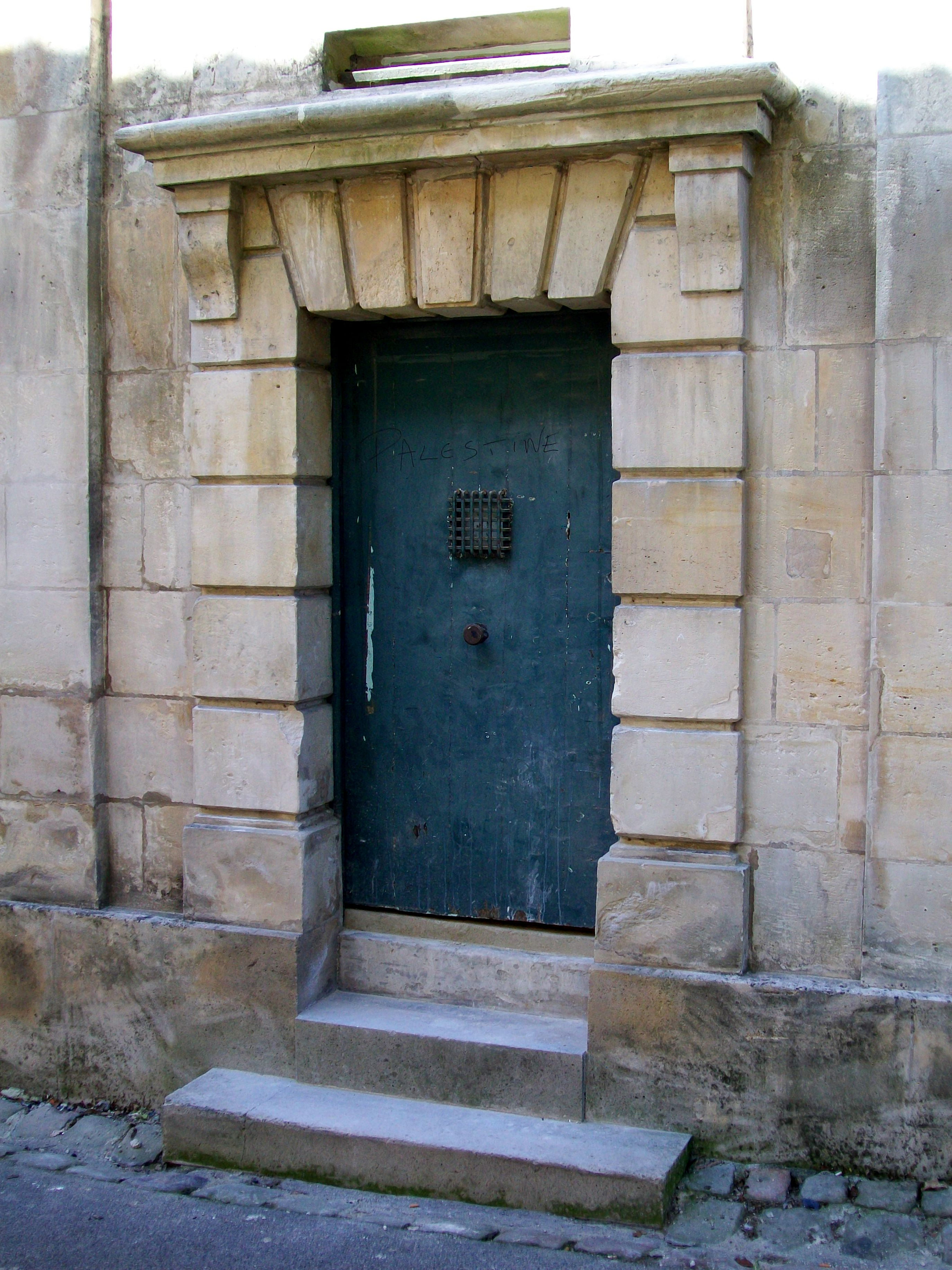 La porte de l'ancienne prison aménagé dans l'ancien hôpital de la Charité après sa fermeture en 1838, rue de la Poterne.